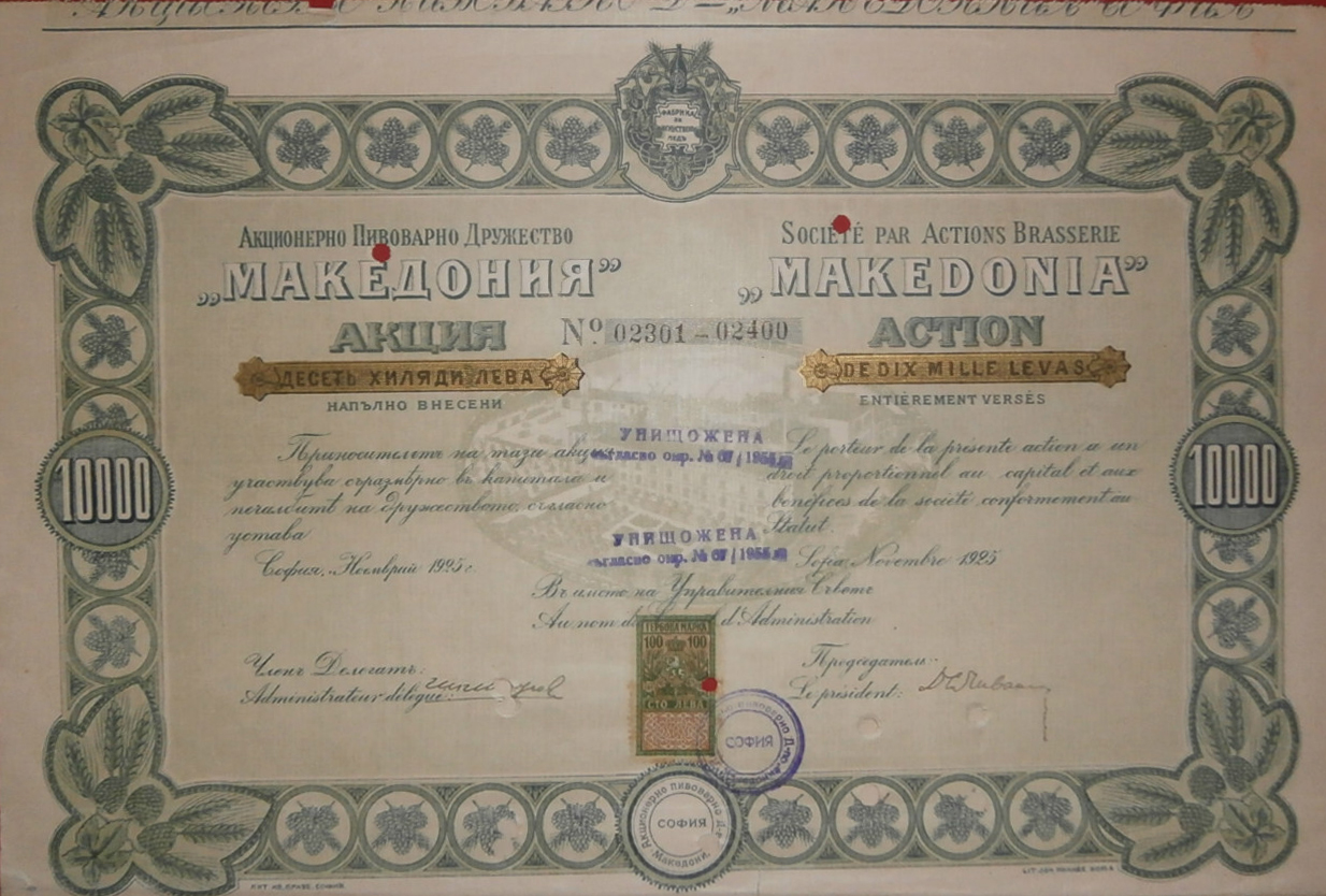 Акция на Акционно пивоварно дружество „Македония“